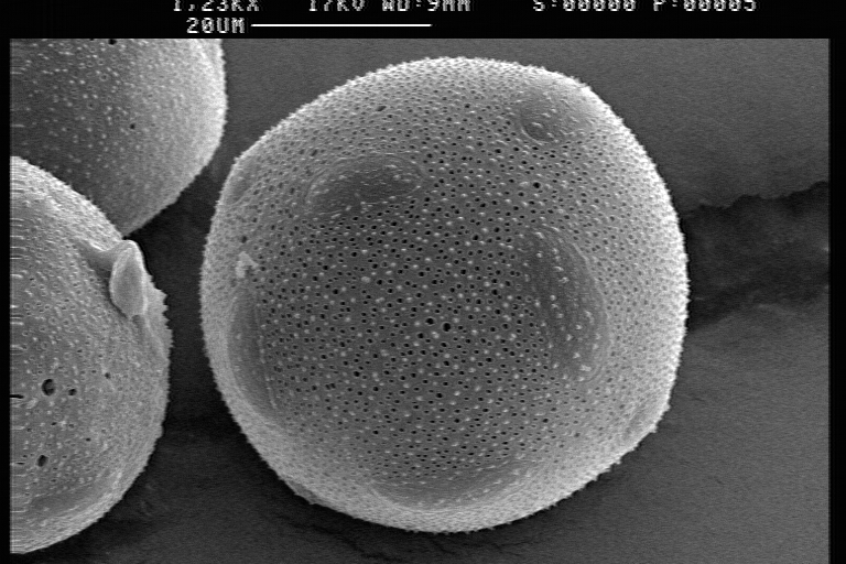 Hatiora rosea Pollen